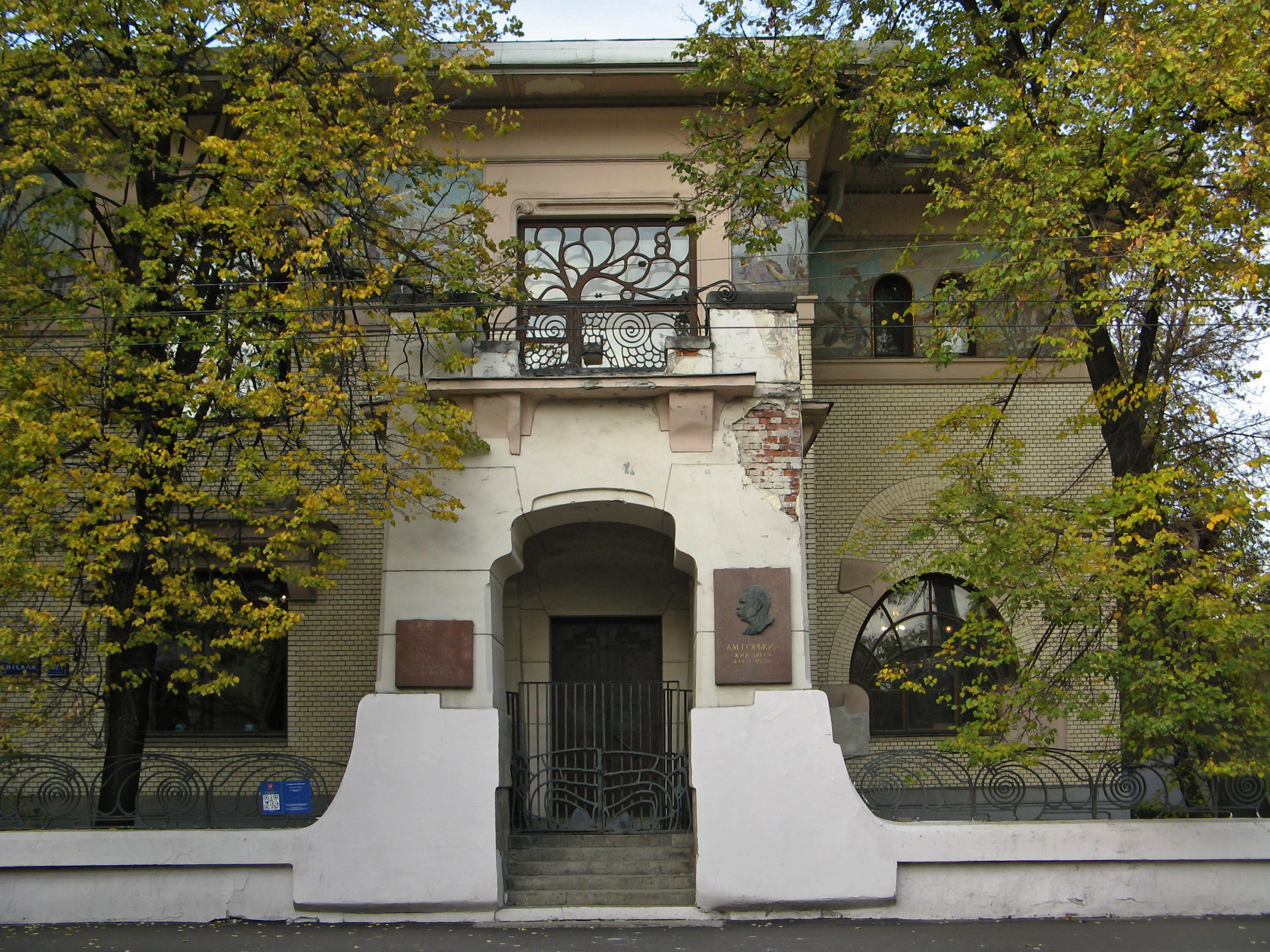 Особняк Рябушинского: Никитская М. ул., дом 6/2, строение 5, Пресненский, Центральный округ, Москва